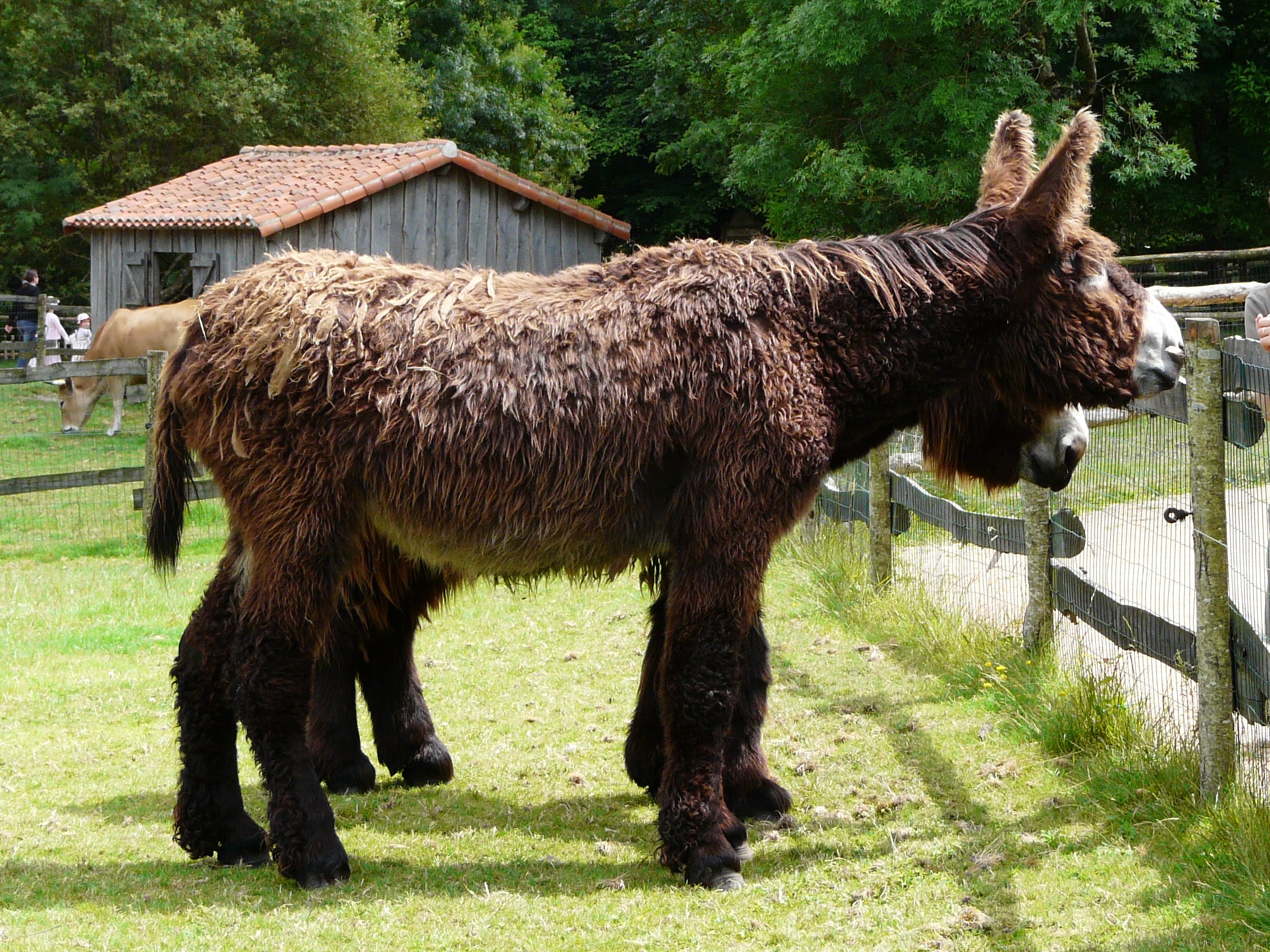 Baudets du Poitou, grand parc du Puy du Fou, Vendée, France